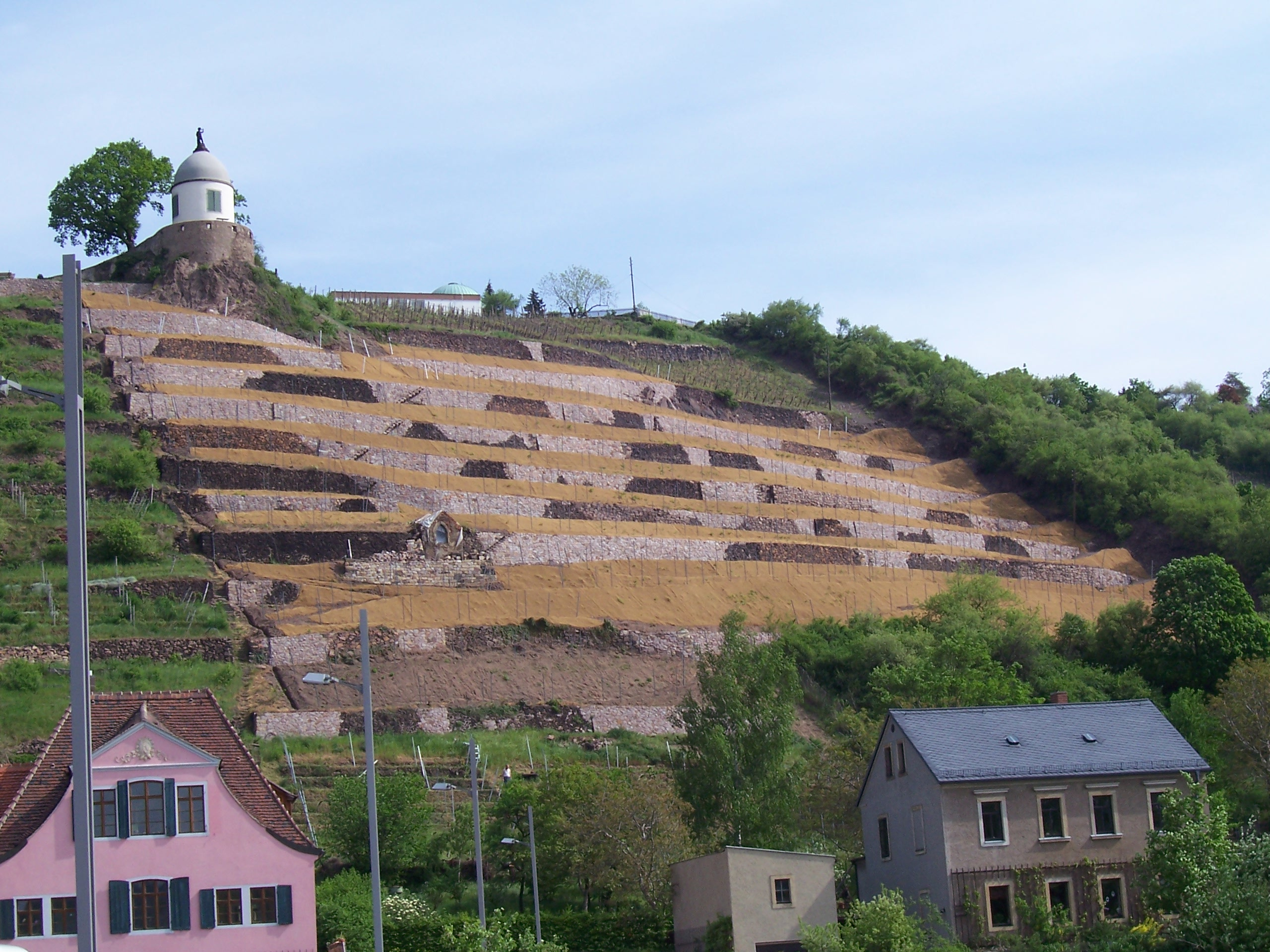 Radebeul, Weinberge